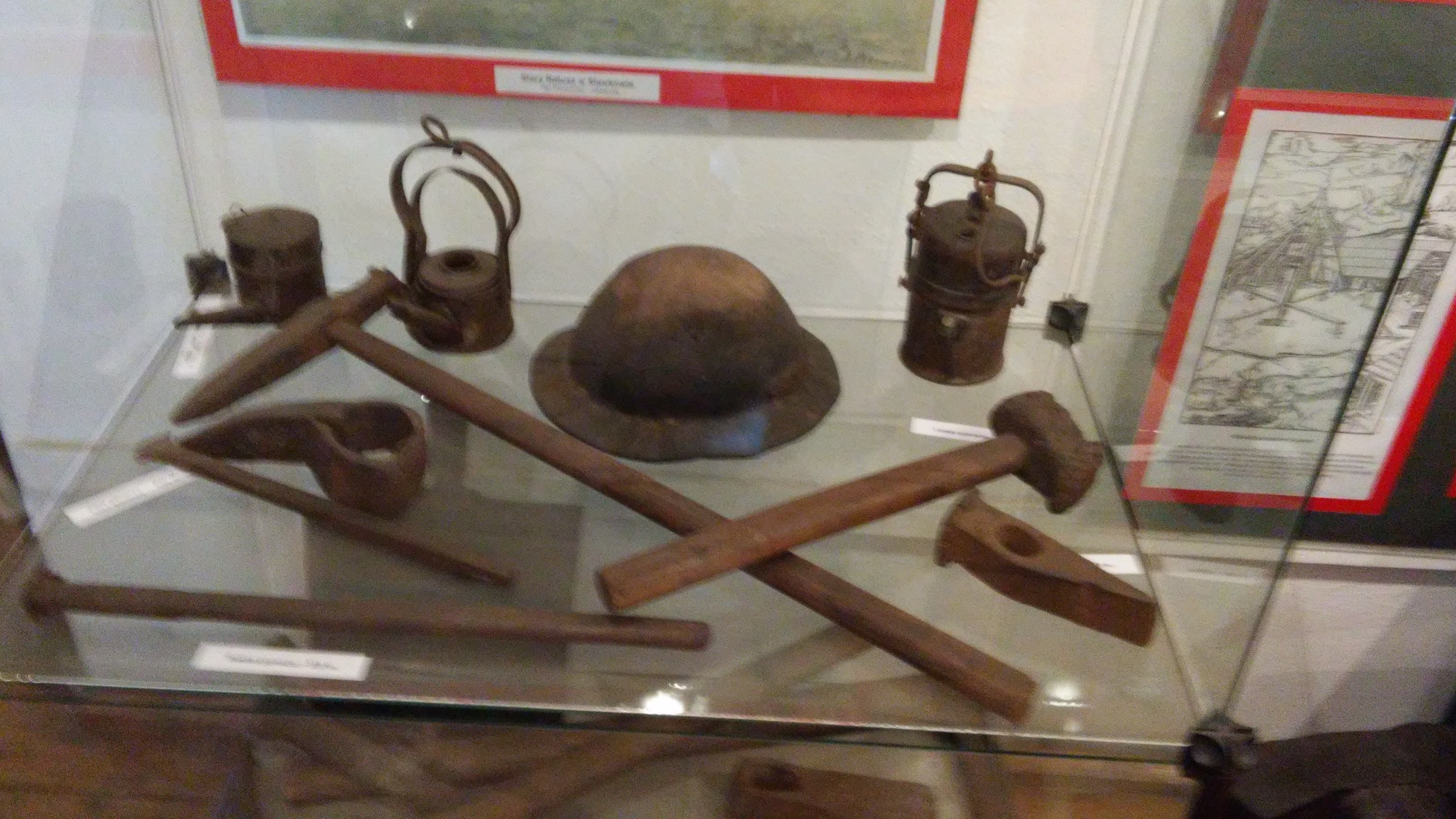 Przyrządy górnicze w Muzeum Regionalnym w Sławkowie